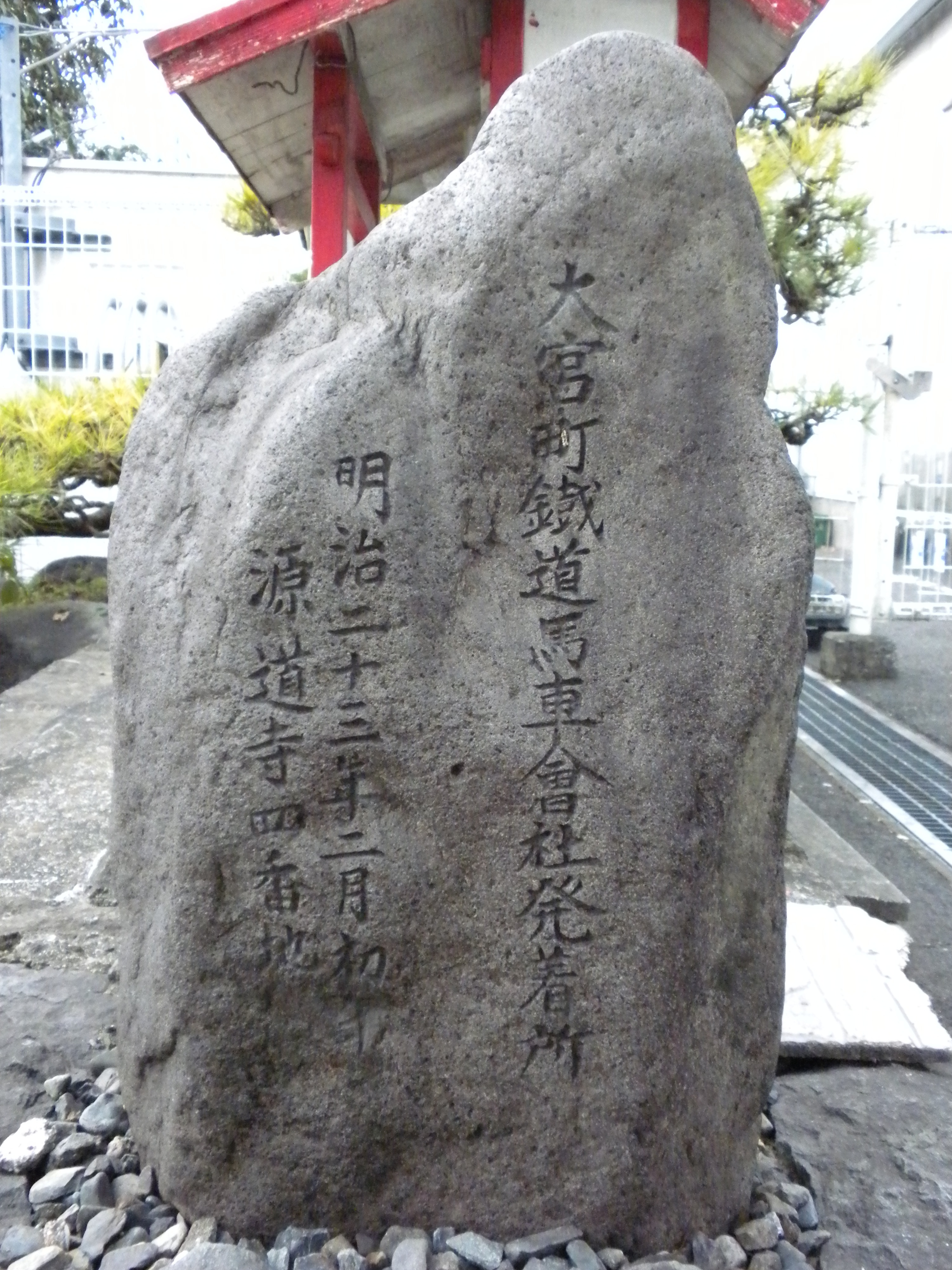 大宮町鉄道馬車会社の碑（富士宮市弓沢町）